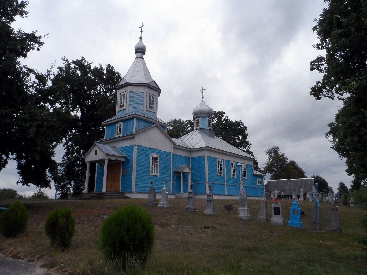 Чарняны. Свята-Прачысценская царква